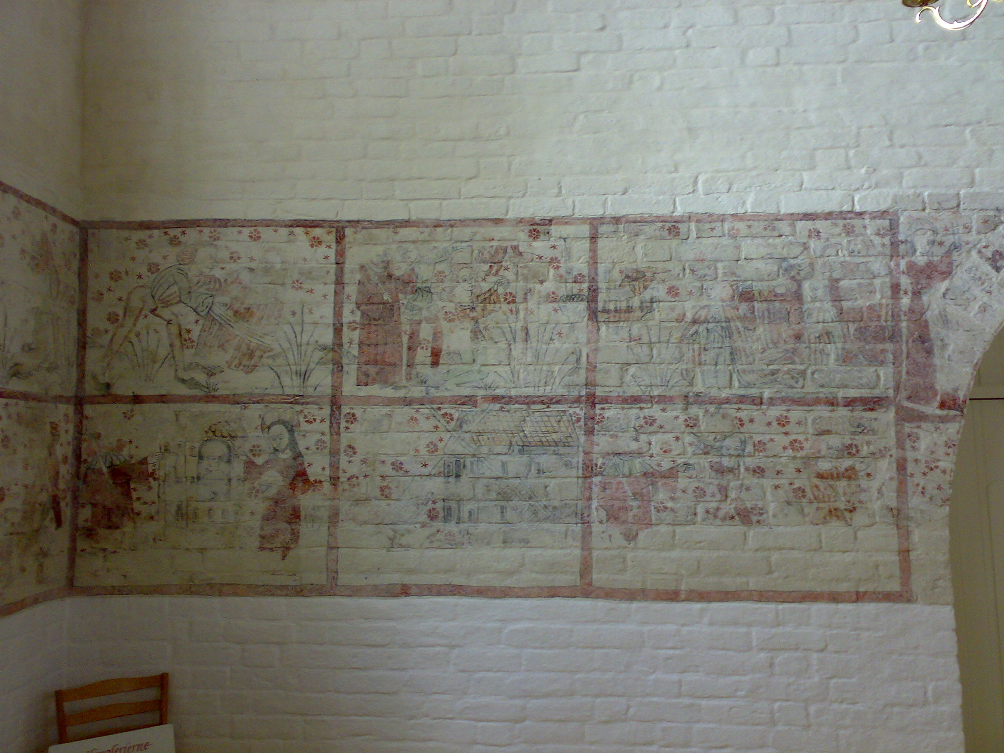 Fresco in Nibe Church, Denmark